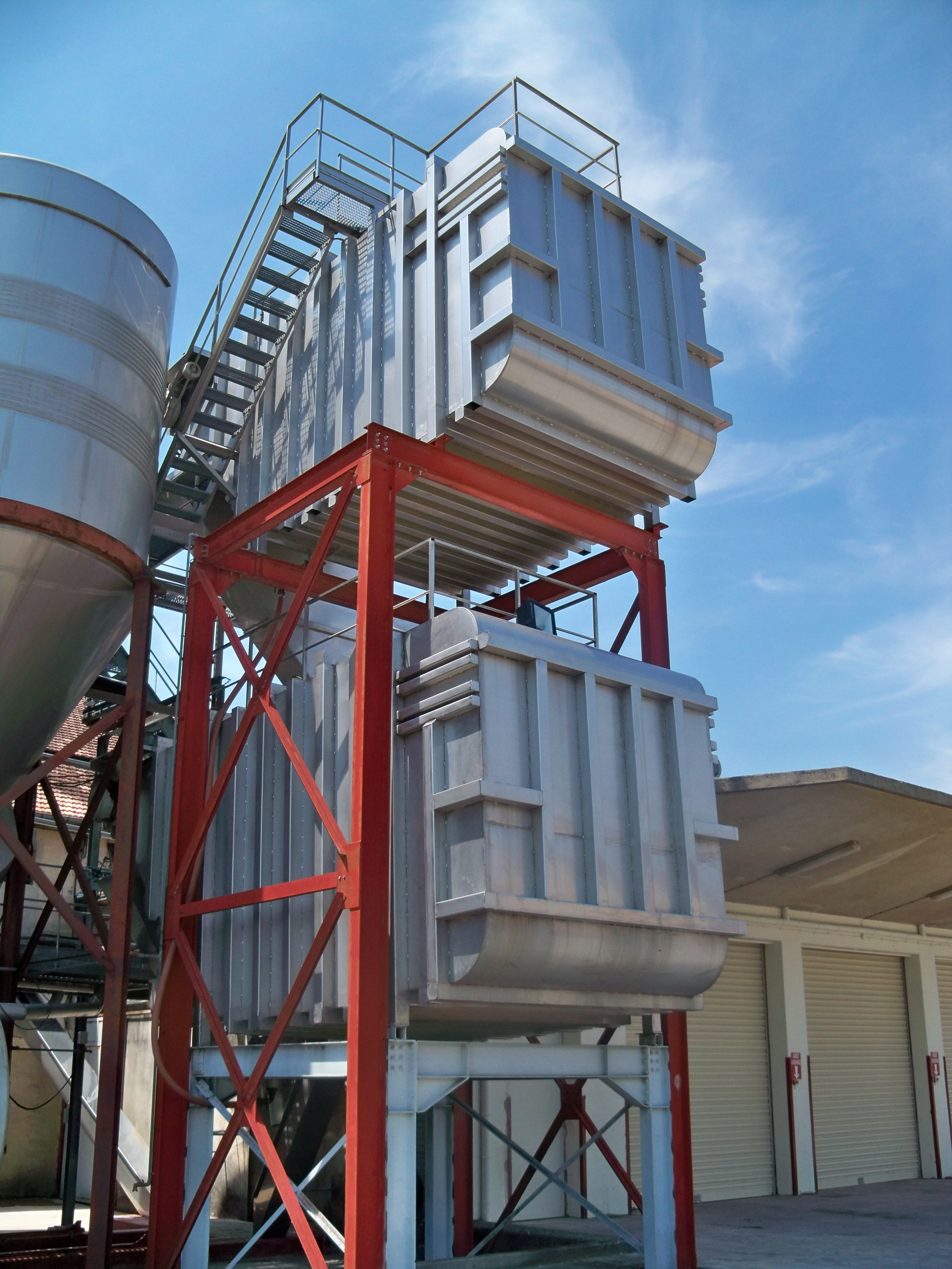 Cuves autovidantes de la marque FABBRI